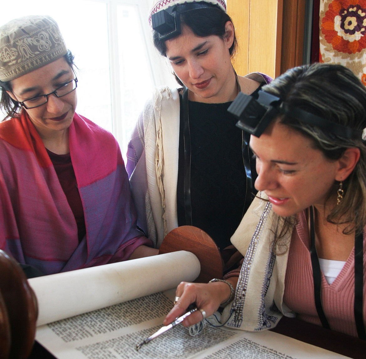 רבות של התנועה המסורתית קוראות מהתורה